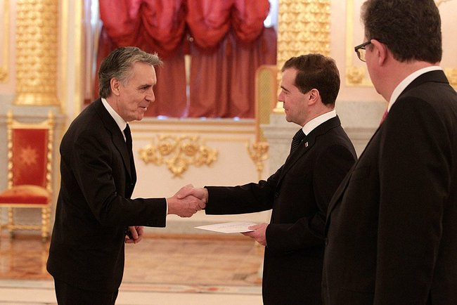 Верительную грамоту Президенту России вручает посол Королевства Испания Луис Фелипе Фернандес де ла Пеньа.